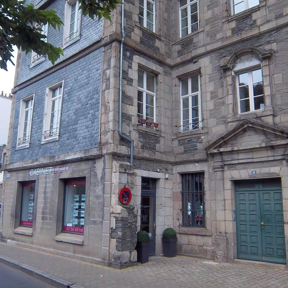 Photographie prise en 2017 à l'emplacement où se trouvait l'ancienne maison des Tournemouche à Morlaix.